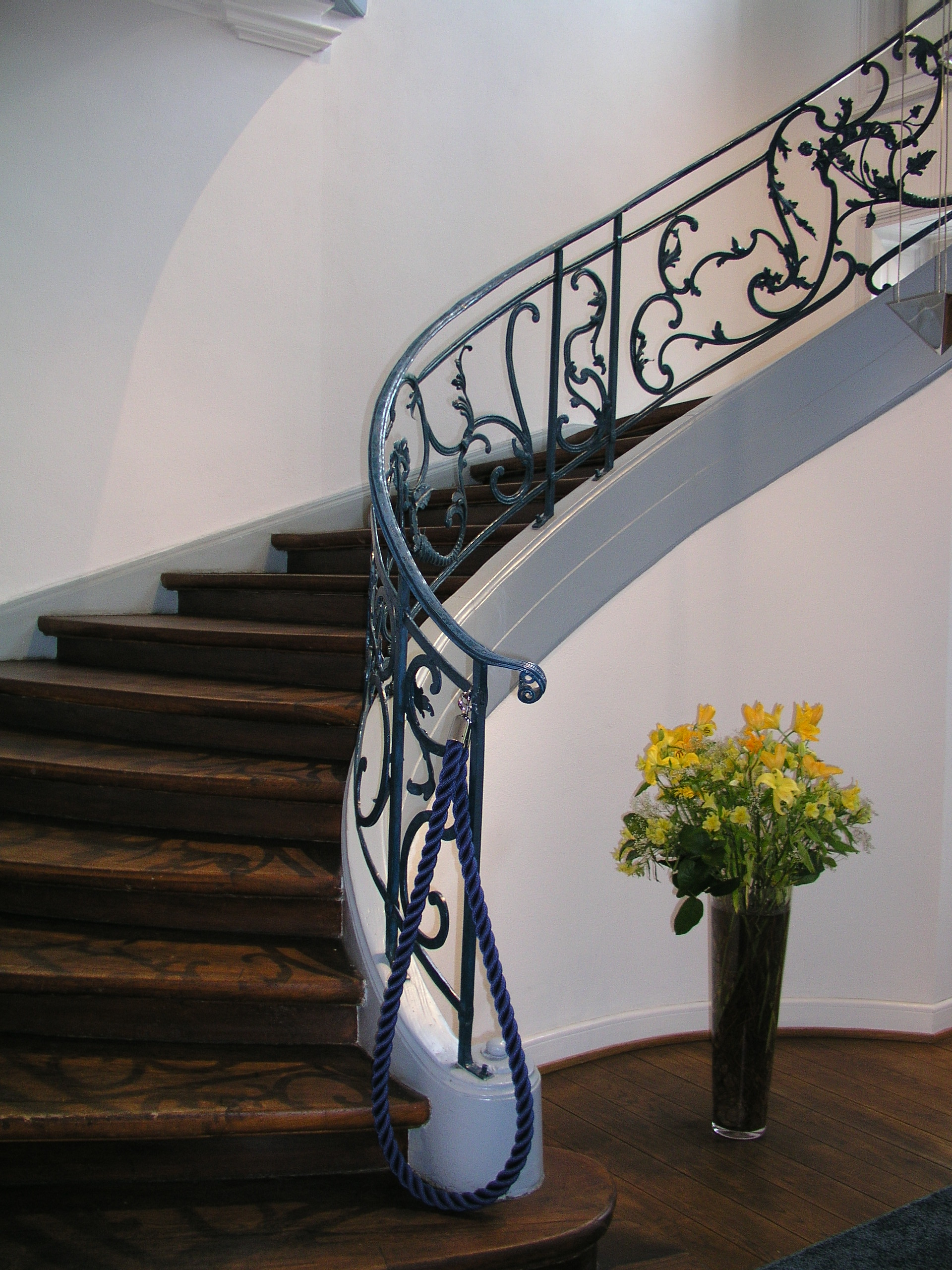 Treppe im Magnushaus in Berlin (2)